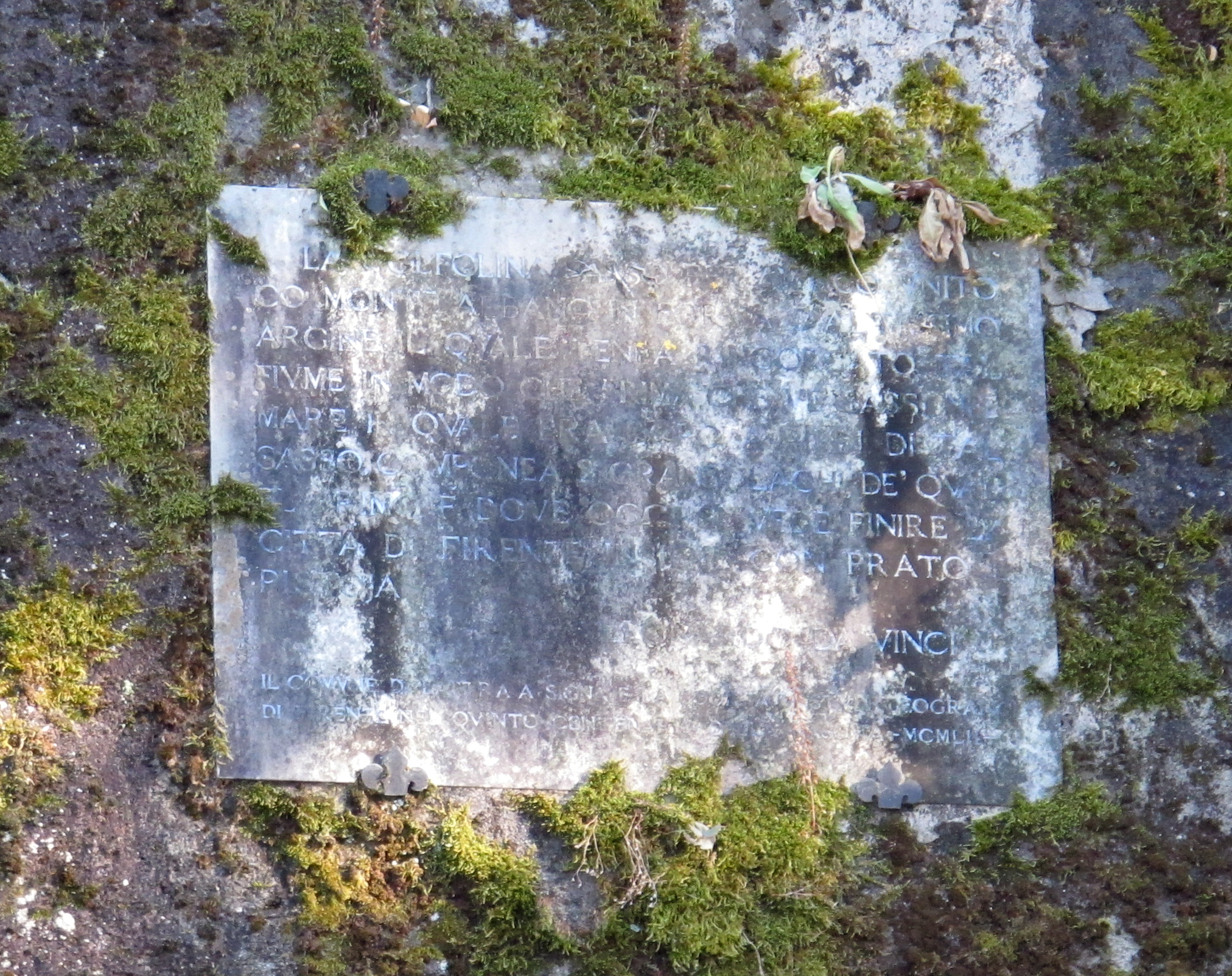 Gonfolina